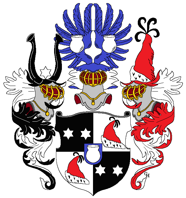 Wappen des sächsischen Gutsbesitzers und Politikers Friedrich Krug von Nidda und von Falkenstein (1860–1934), Fideikommisherr auf Frohburg und Kleineschefeld, nachdem dieser am 1. März 1924 eine Wappenvereinigung mit den Freiherren von Falkenstein und eine Eintragung in das Adelsbuch der sächsischen Stiftung für Familienforschung erhalten hatte. Zeichnung von Gerd Hruška (